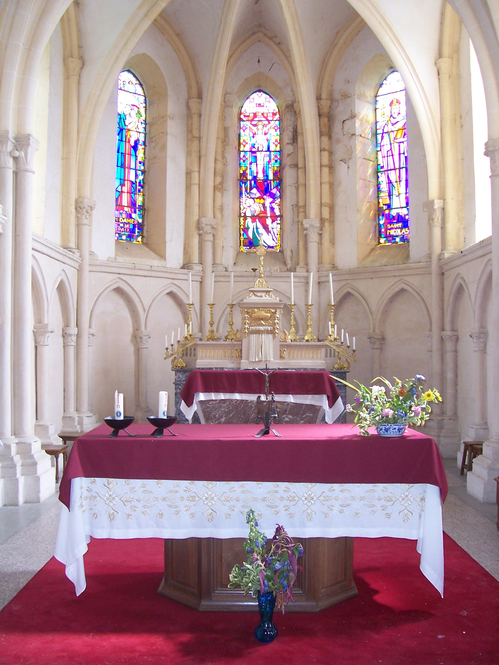 Cornay (Ardennes, France) - L'église de Cornay.